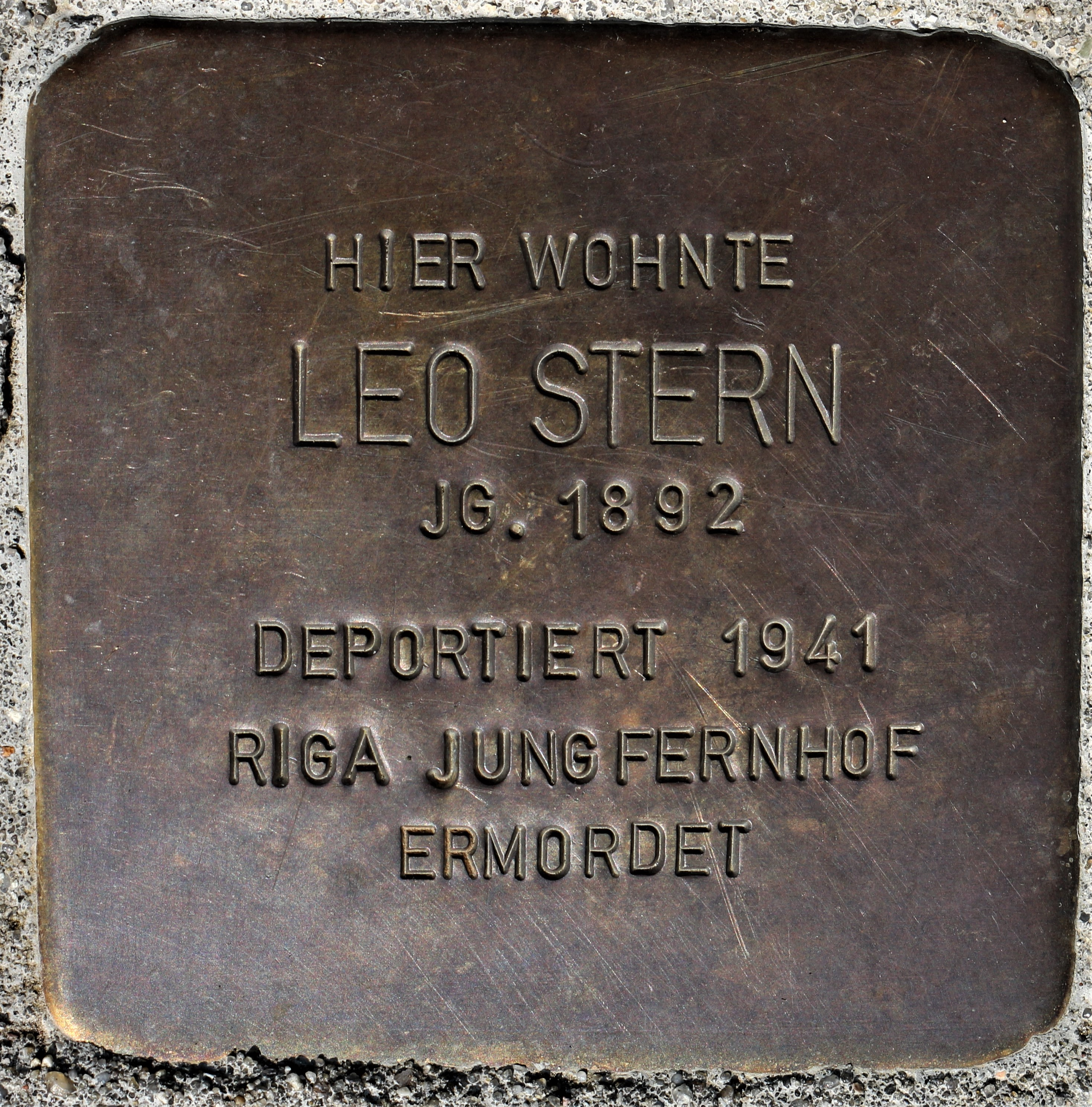 Stoperstein für Leo Stern, Franklinstraße 5 in Göppingen